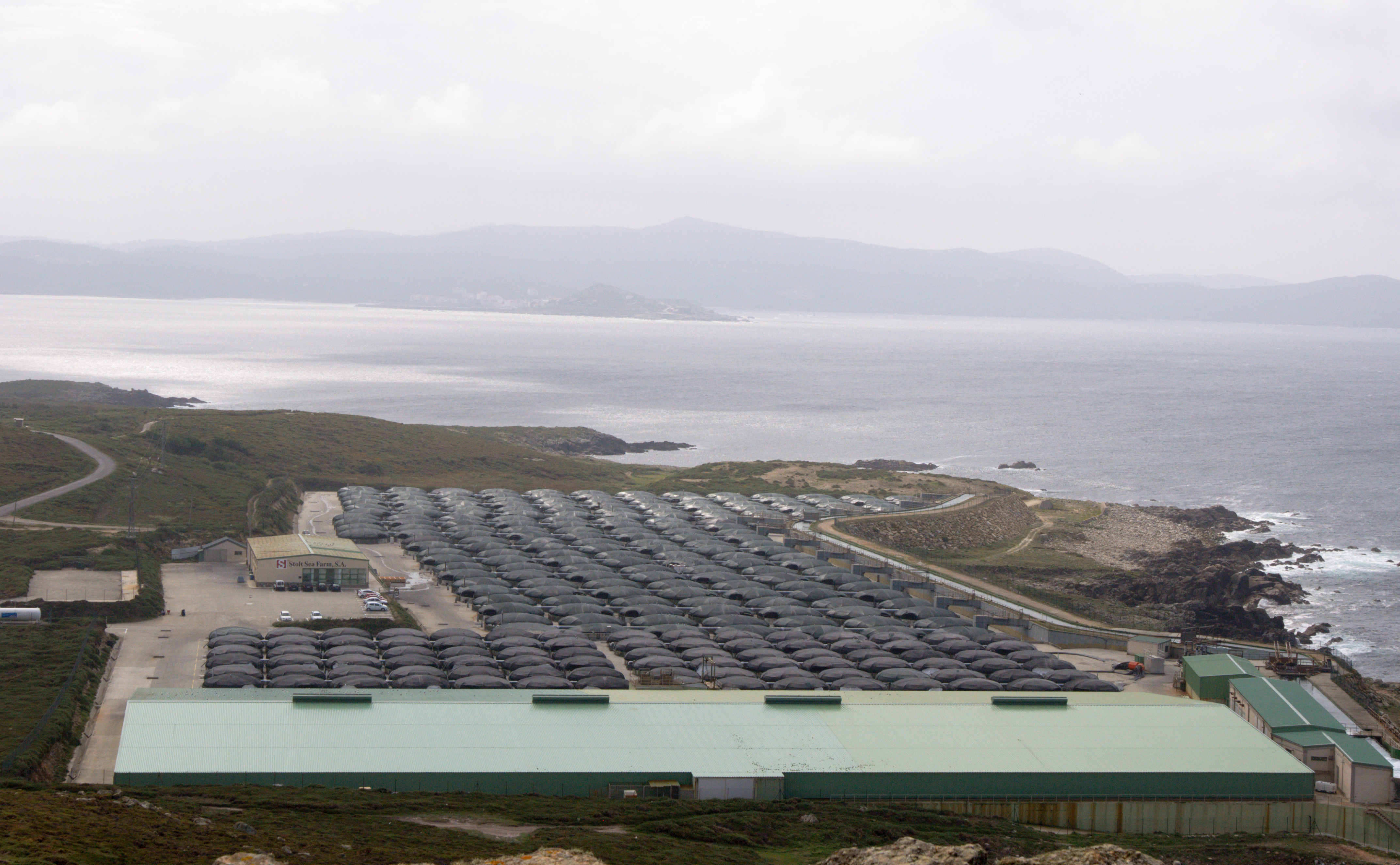 Acuicultura en el Cabo Vilán